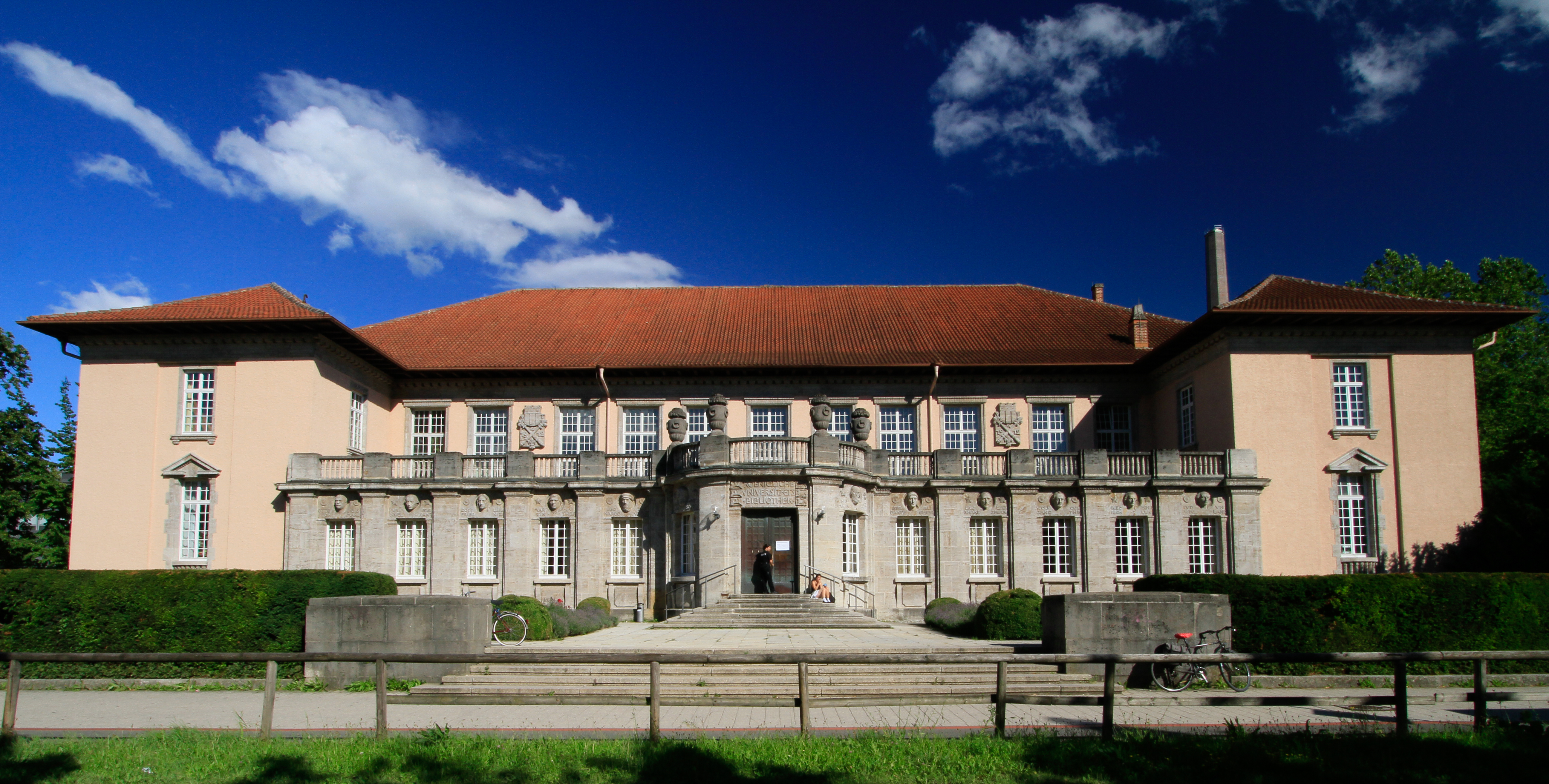 Das erste speziell für die Universitätsbibliothek Tübingen erbaute Gebäude, der „Bonatzbau“.